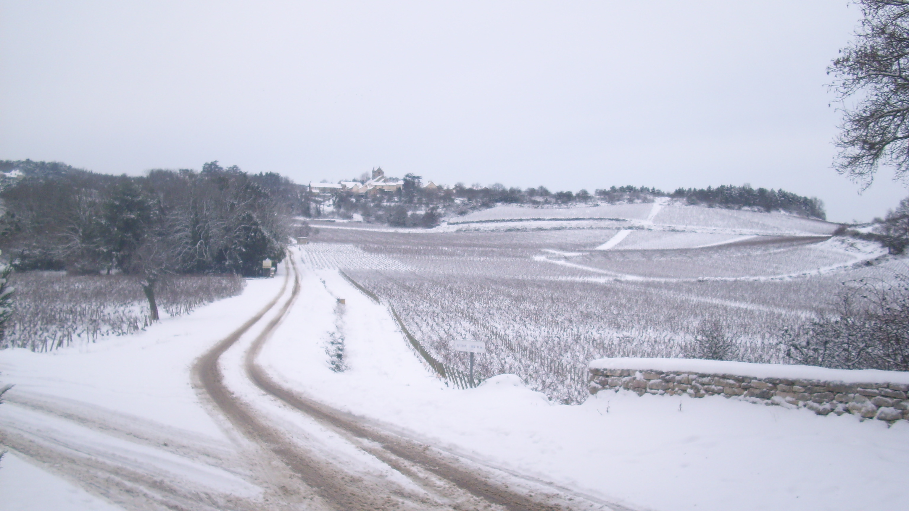 Vue d'une partie du vignoble de Mercurey (Mercurey 1er cru Clos du Roy) vers Touches.